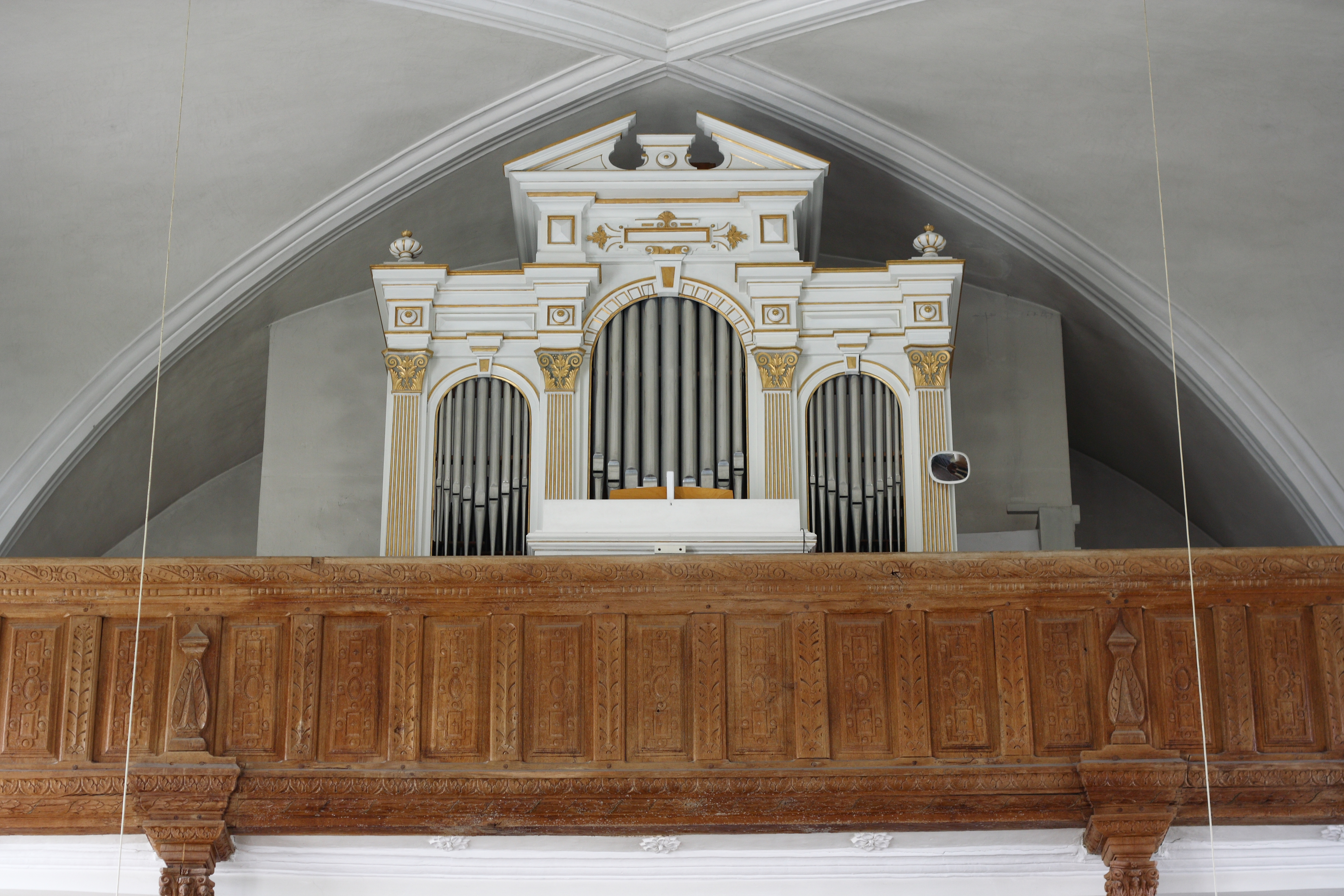 Evangelisch-lutherische Dreifaltigkeitskirche in Haunsheim, einer Gemeinde im Landkreis Dillingen an der Donau (Bayern), Orgelempore, Brüstung aus Eichenholz mit Flachschnitzerei, Orgel von dem Ulmer Orgelbaumeister Heinrich Conrad Branmann (1840–1882)